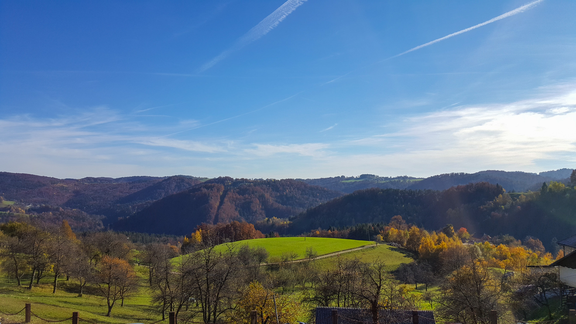 Podkum